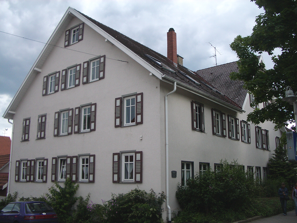 Wilhelmsdorf (Württemberg), Germany: ehemaliges Kinderheim Hoffmannhaus am Saalplatz